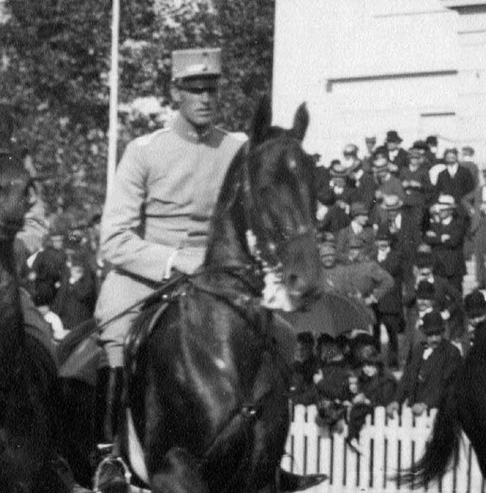 Frank Martin